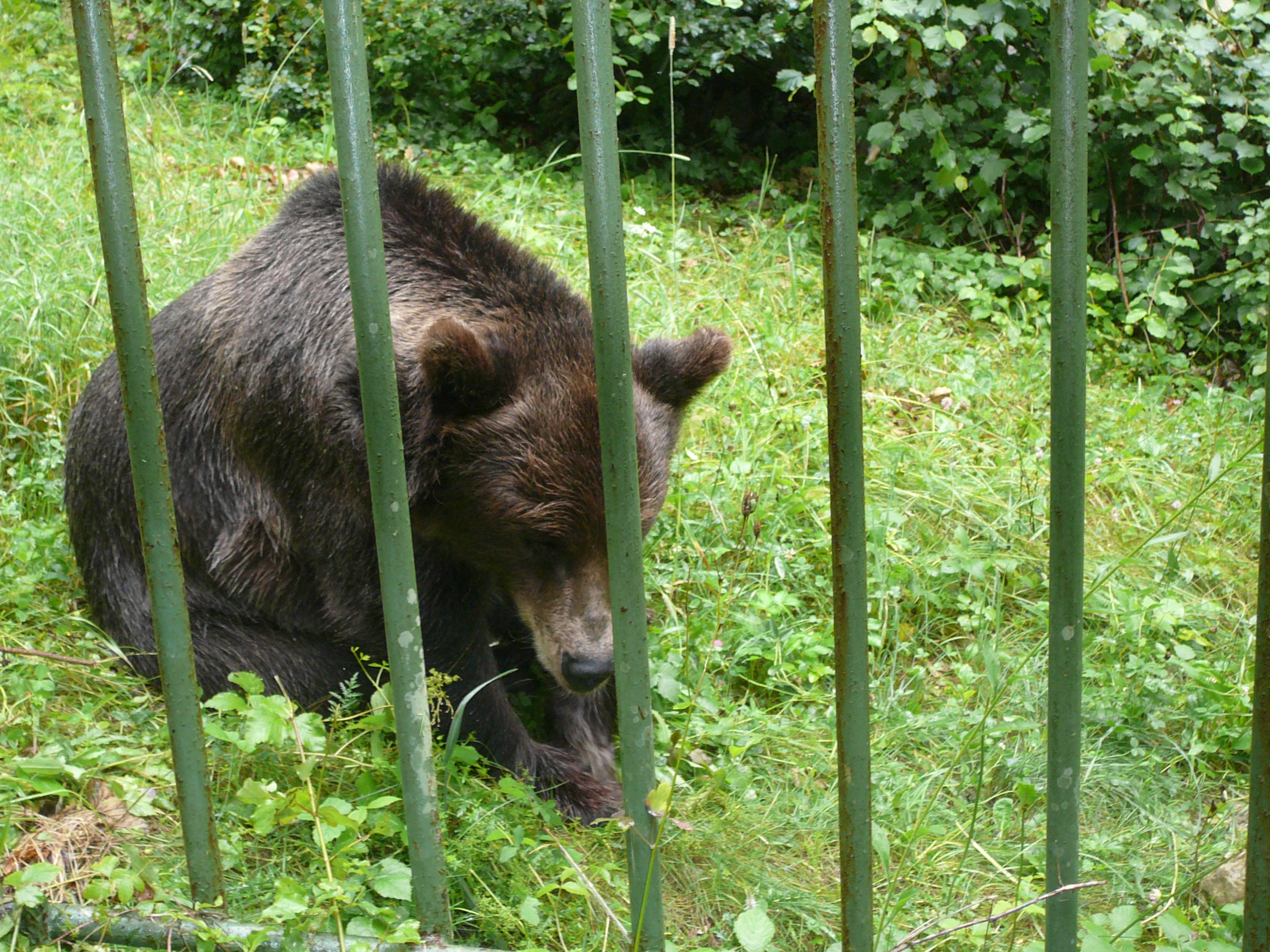 Orso bruno presso Parco Faunistico Spormaggiore